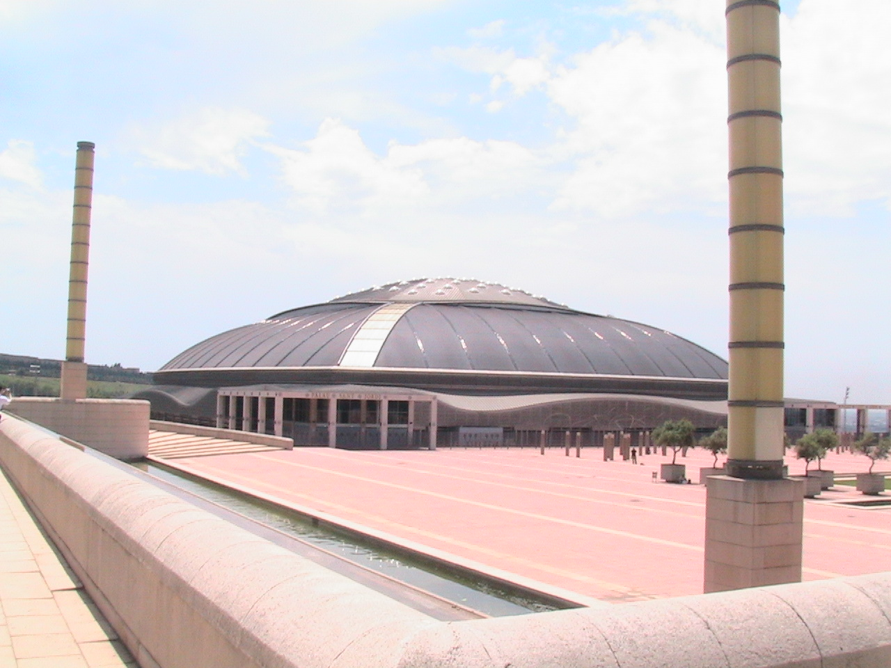 Palau Sant Jordi, Montjuïc, Barcelona, Catalunya.